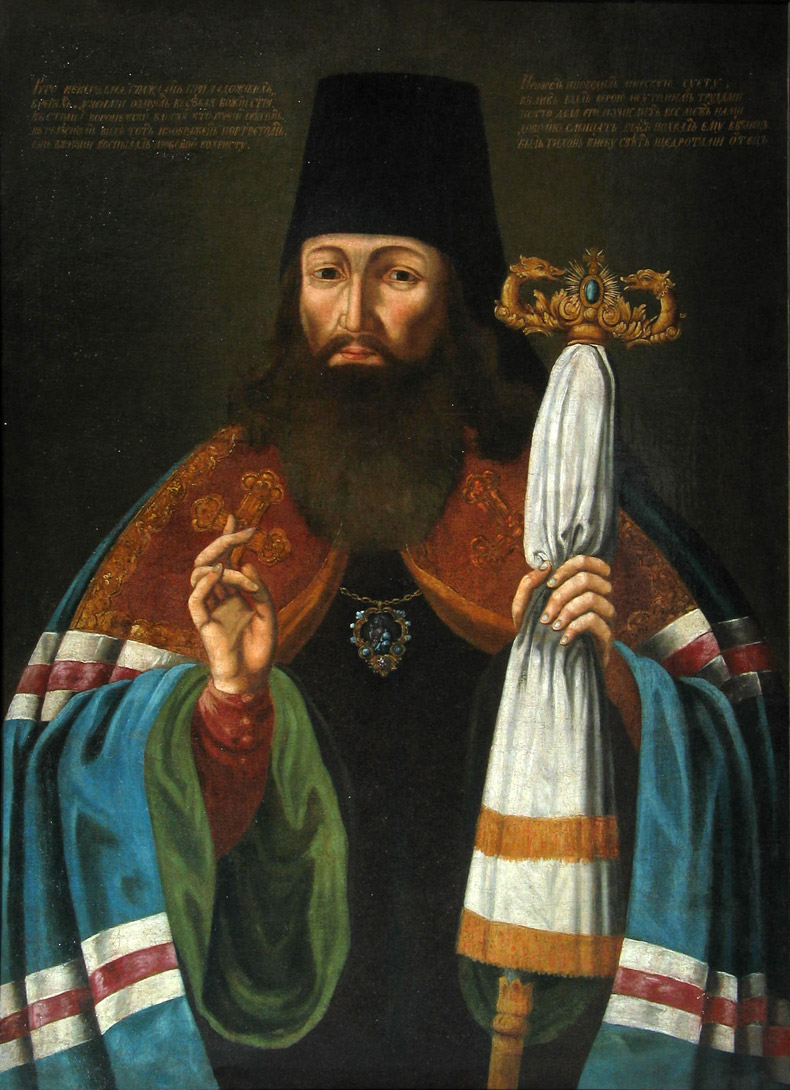 Портрет Тихона Задонского, епископа Воронежского и Елецкого. Холст, масло. Размеры: 98 х 73 см. В верхней части картины надпись: «Кто кексголма гражданъ при ладожскихъ брегахъ, ученми озарялъ въсѣляя Божiй страхъ. Въ странѣ воронежской блисталъ кто горнимъ свѣтомъ, въ телѣсномъ видъ тотъ изображенъ портретомъ. Онъ в жизни воспылалъ любовiю ко Христу Призрелъ и победилъ мирскую суету. Вѣликъ былъ верою неутолимъ трудами но кто дела его изчислитъ все межъ нами довольно слышать гласъ похвалъ ему въ вѣнецъ былъ Тихонъ к небу свѣтъ щедротами отецъ».